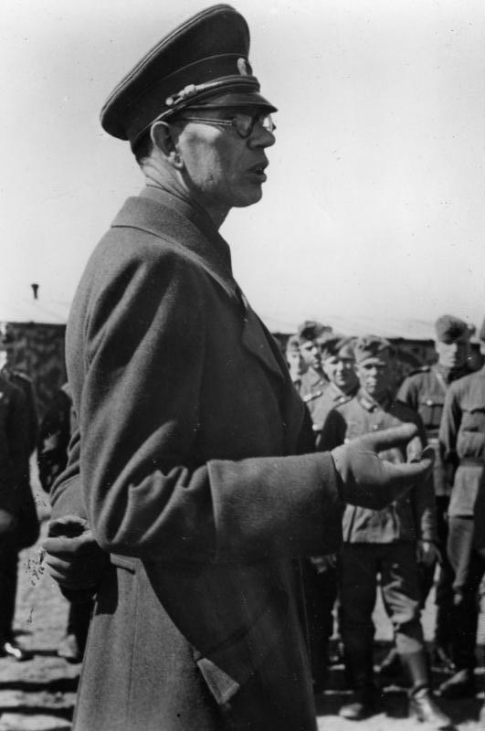 Andrej Andrejewitsch Wlassow Scherl Bilderdienst Generalleutnant Wlassow, der Vorsitzende des Befreiungskomitees für die Völker Russlands, spricht an der Ostfront zu Ostfreiwilligen. PK-Aufnahme 18.11.1944 Abgebildete Personen: Wlassow, Andrej Andrejewitsch: General, Komitee zur Befreiung der Völker Rußlands, am 1.8.1946 in Moskau hingerichtet, Sowjetunion